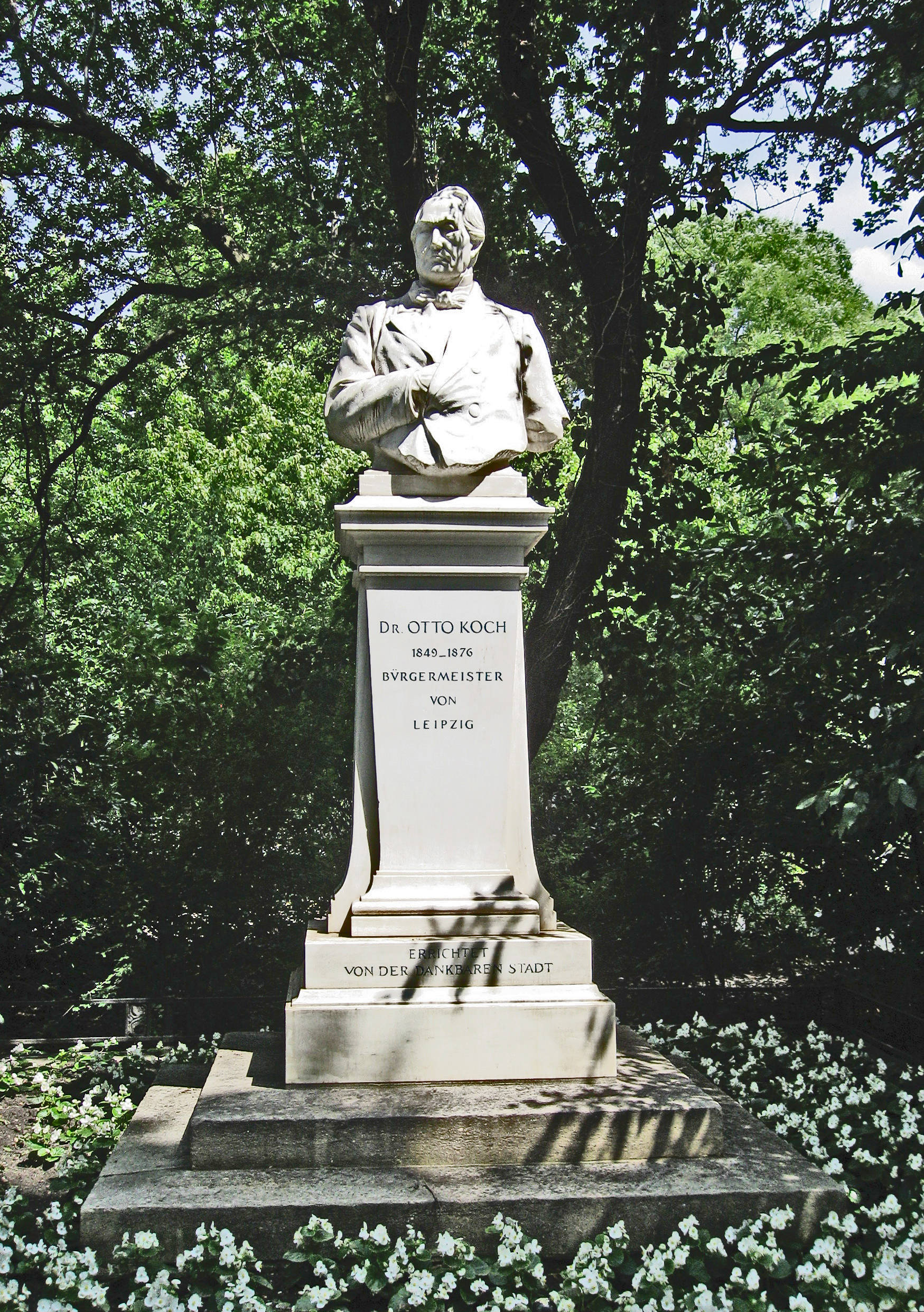 Bürgermeister-Koch-Denkmal in Leipzig auf einem Hügel im Schillerpark südöstlich der MoritzbasteiBüste: Carl SeffnerPostament: Emil Friedrich Rayhererrichtet im November 1898, eingeweiht am 16. Mai 1899